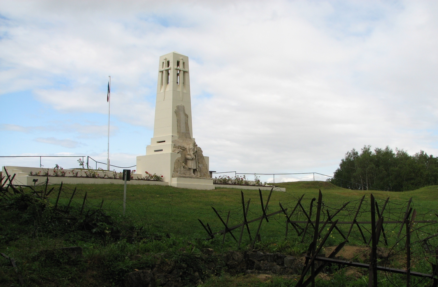 Nommé Aux combattants et aux morts de Vauquois et oeuvre de l'architecte Monestier et du sculpteur Roussel, ce monument est situé sur la butte de Vauquois dans la Meuse. Il est construit sur l'emplacement de l'ancienne mairie du village détruit pendant les longs combats de la Première Guerre mondiale qui se déroulèrent sur cette butte. Il représente une pyramide tronquée avec une lanterne des morts à son sommet. Sur le devant est sculpté un poilu en tenue de 1915, avec au dessus un marronnier tronqué. Il représente le marronnier scié à la mitrailleuse par les Allemands car il servait alors de repère pour l'artillerie française